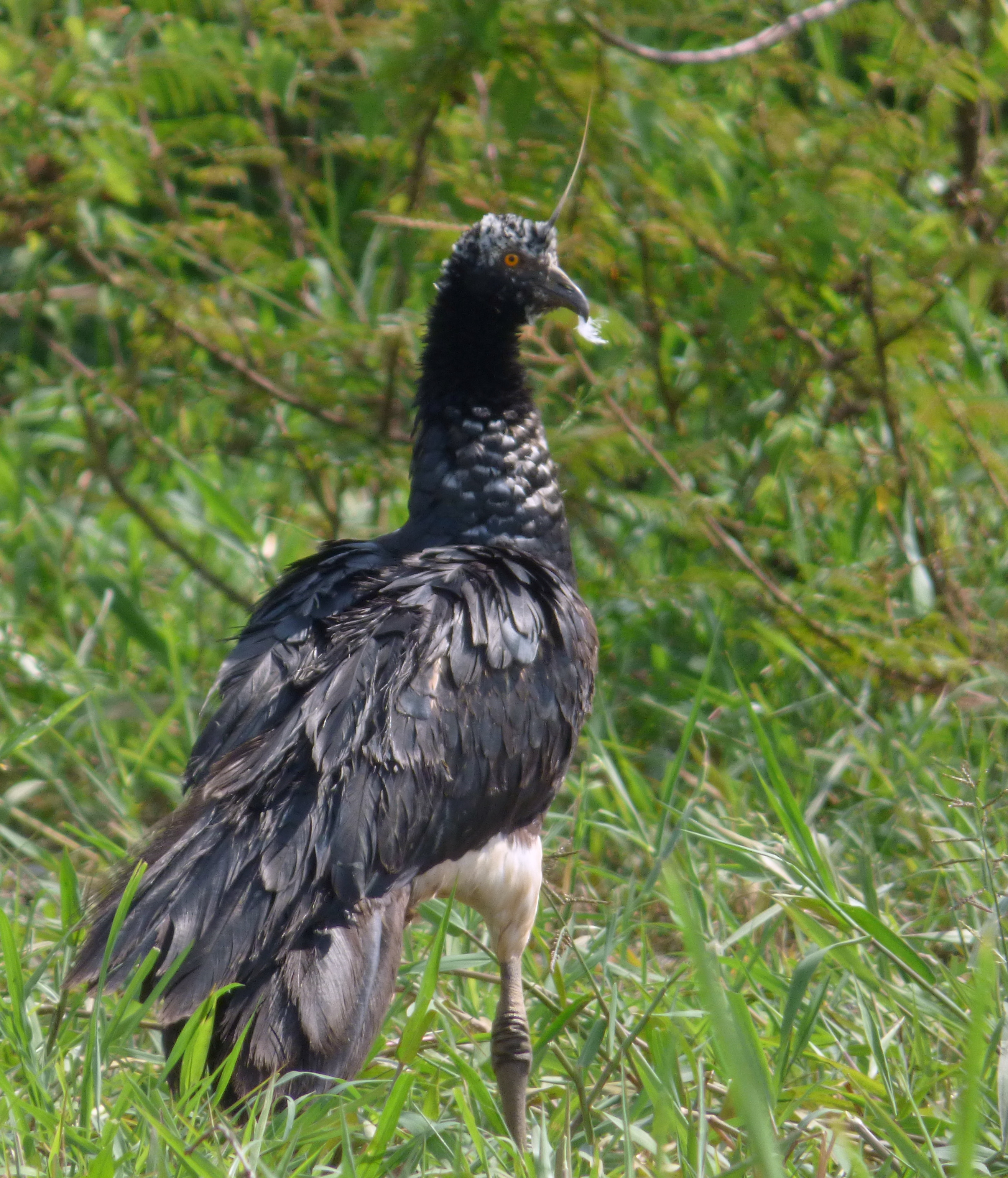 Anhima cornuta (Buitre de ciénaga)